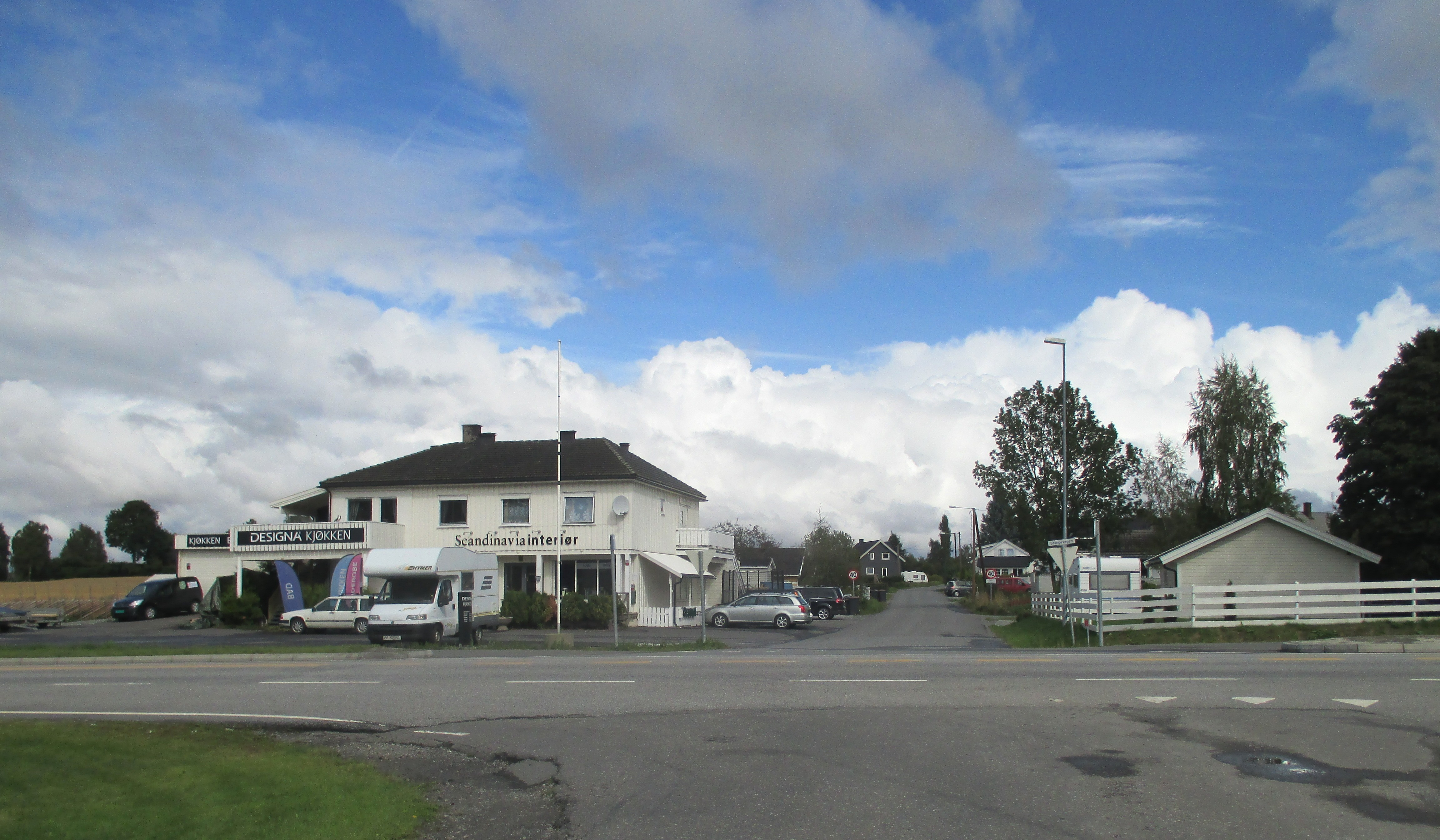 Fylkesvei 222 krysser Ottestadgutua.